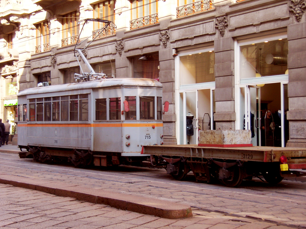 Tram merci in via Orefici a Milano.